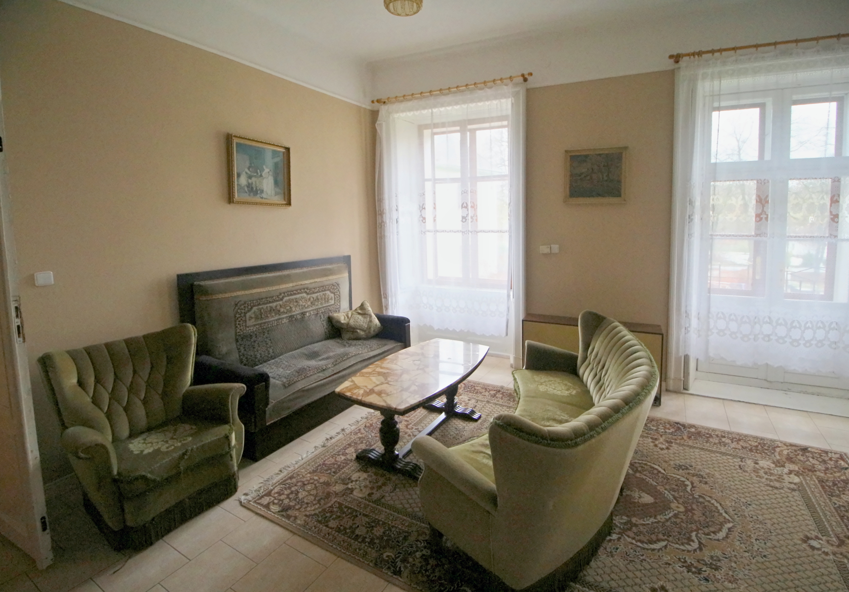 Interiér jindřichovického nového zámku